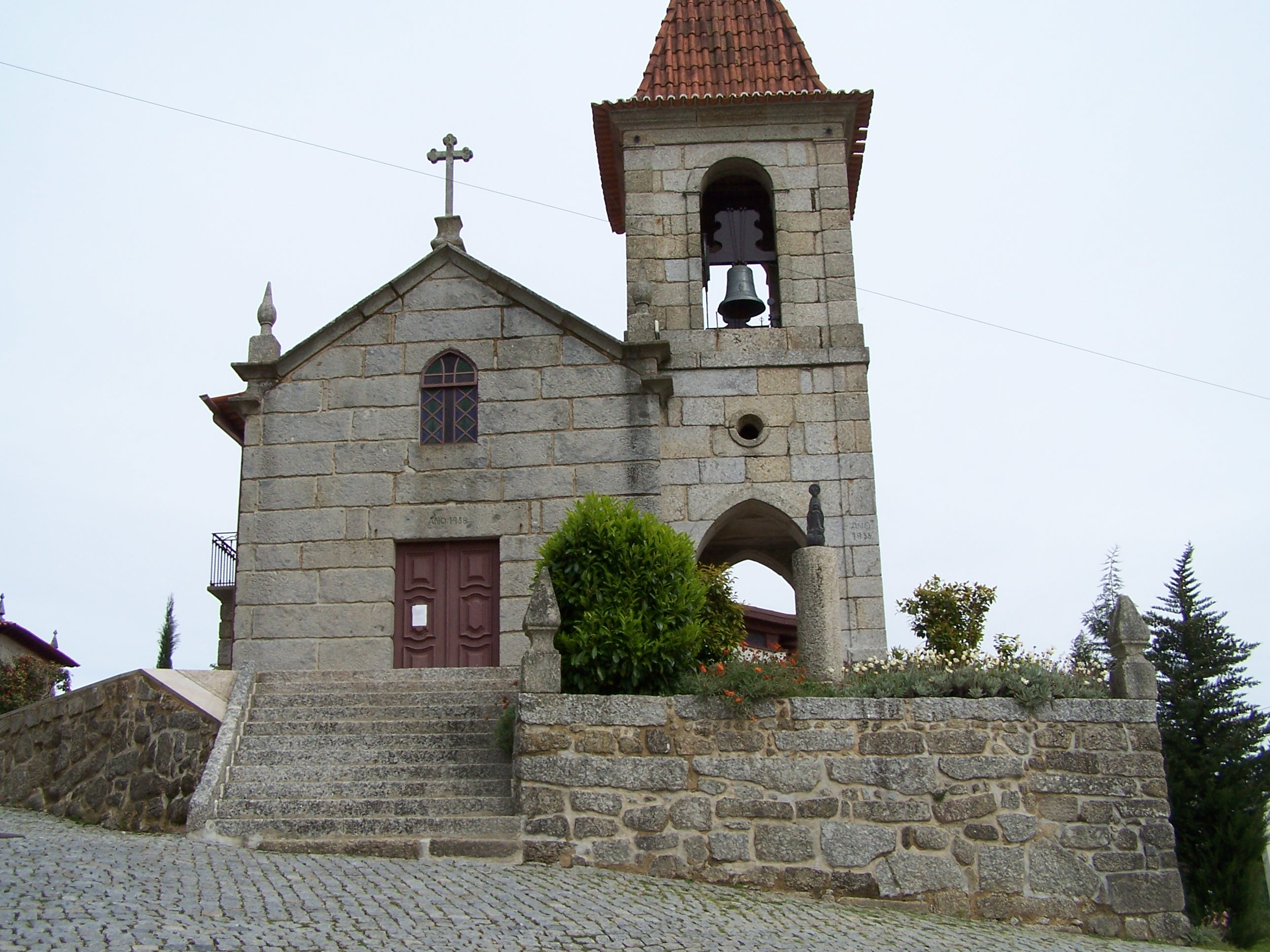 Fachada frontal da Igreja de Figueiredo, Guimarães.